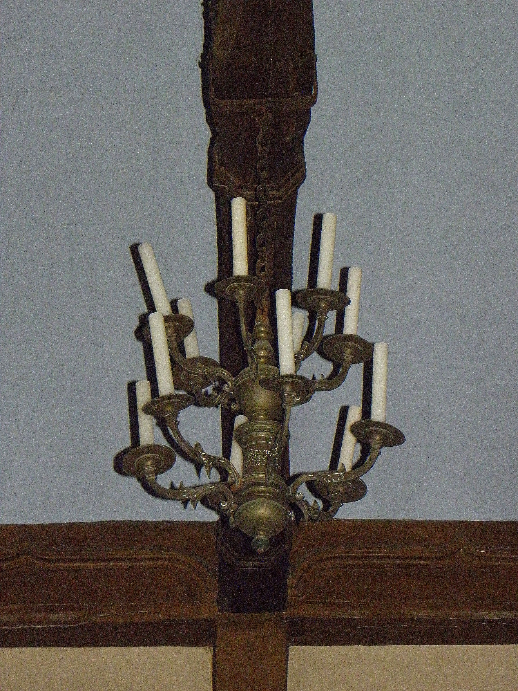 Église Saint-Crépin et Saint-Crépinien de Larchamp (53). Lustre classé.